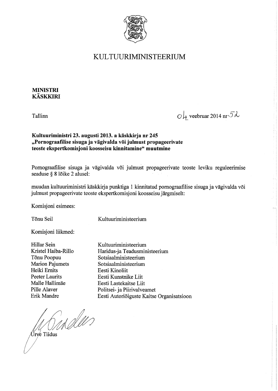 Eesti Vabariigi kultuuriministri Urve Tiiduse (Tiidus) 04.02.2014 käskkiri nr 52 "Kultuuriministri 23. augusti 2013. a käskkirja nr 245 "Pornograafilise sisuga ja vägivalda või julmust propageerivate teoste ekspertkomisjoni koosseisu kinnitamine" muutmine".